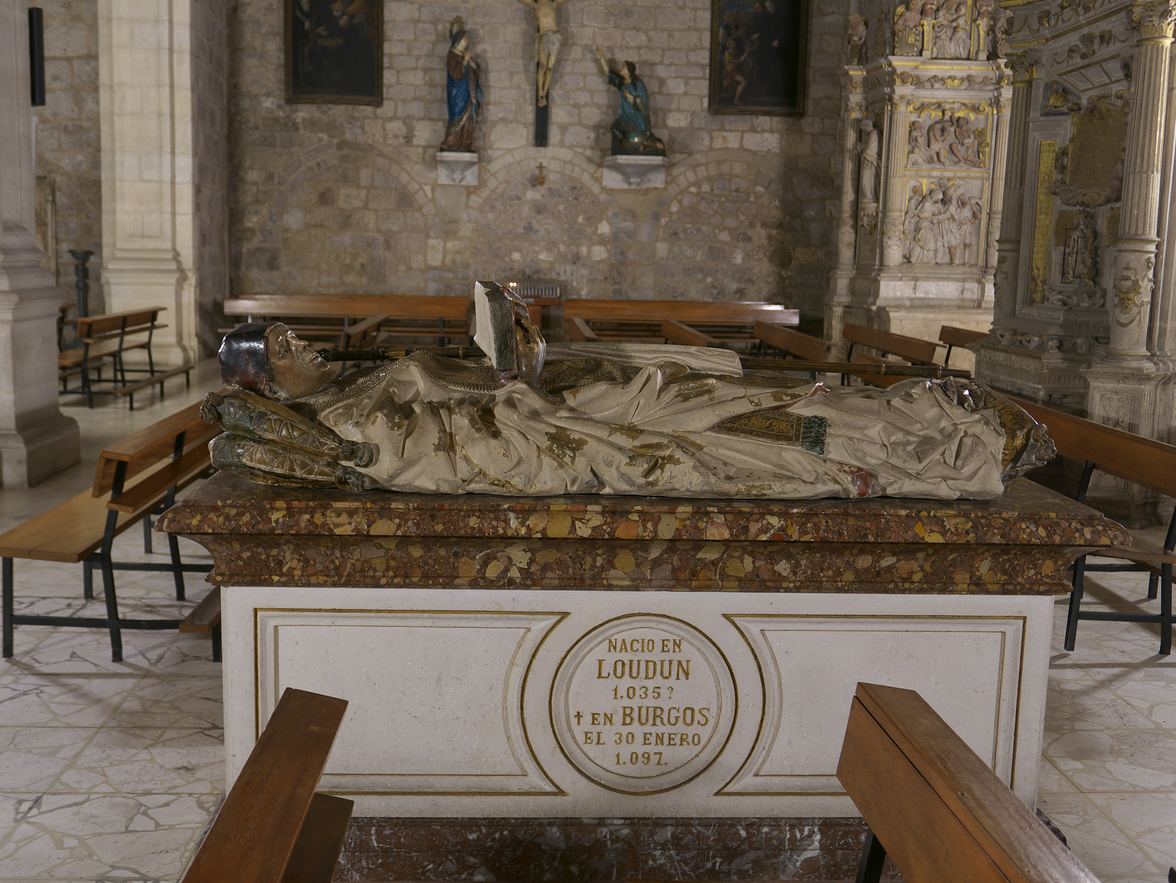 Escultura yacente del benedictino San Lesmes (†1097), patrón de Burgos. Atribuido a Luis de Gabeo y a Juan de Bruselas.